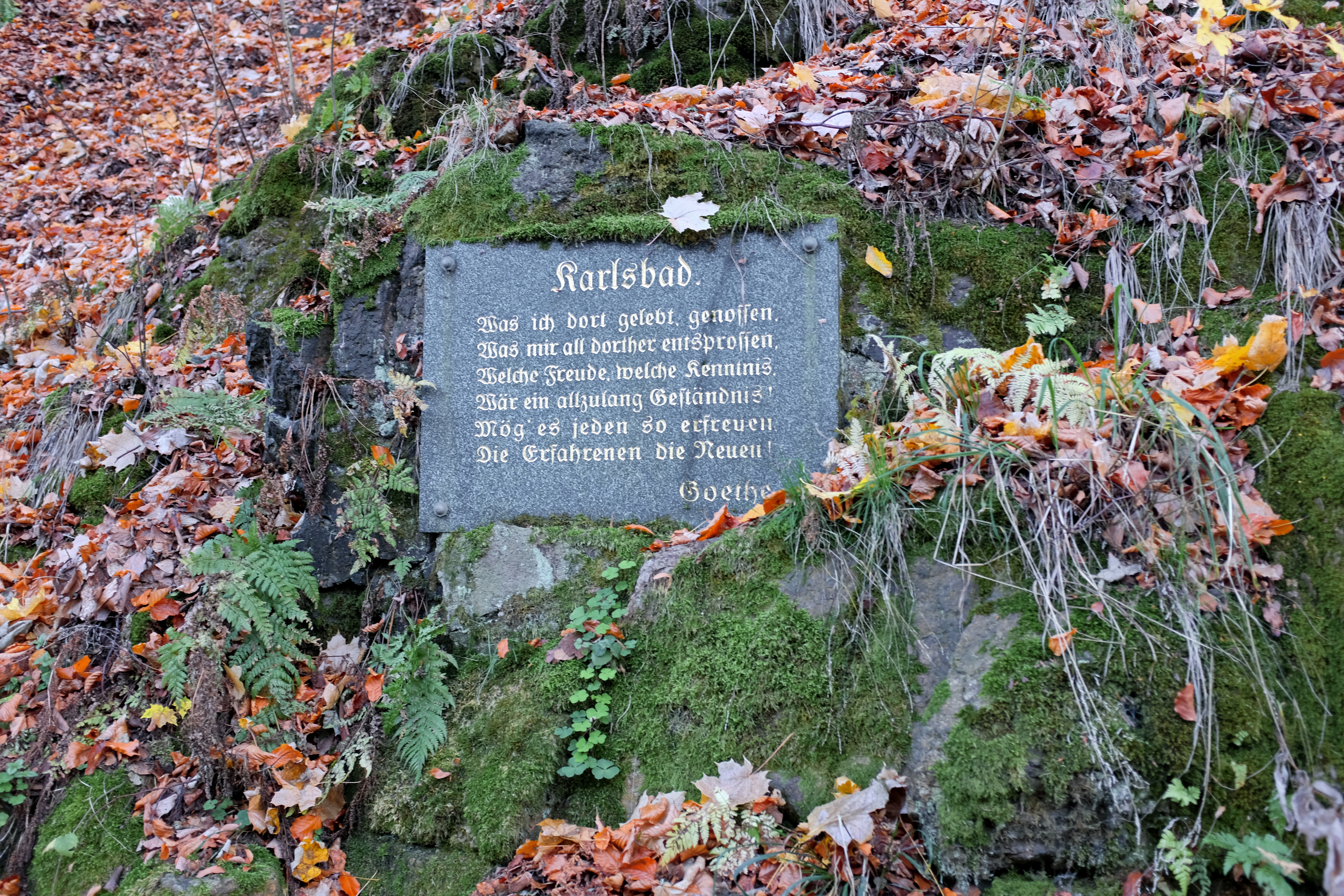 Busta J. W. Goetha, Goethova stezka, parc. 781/1, Karlovy Vary.